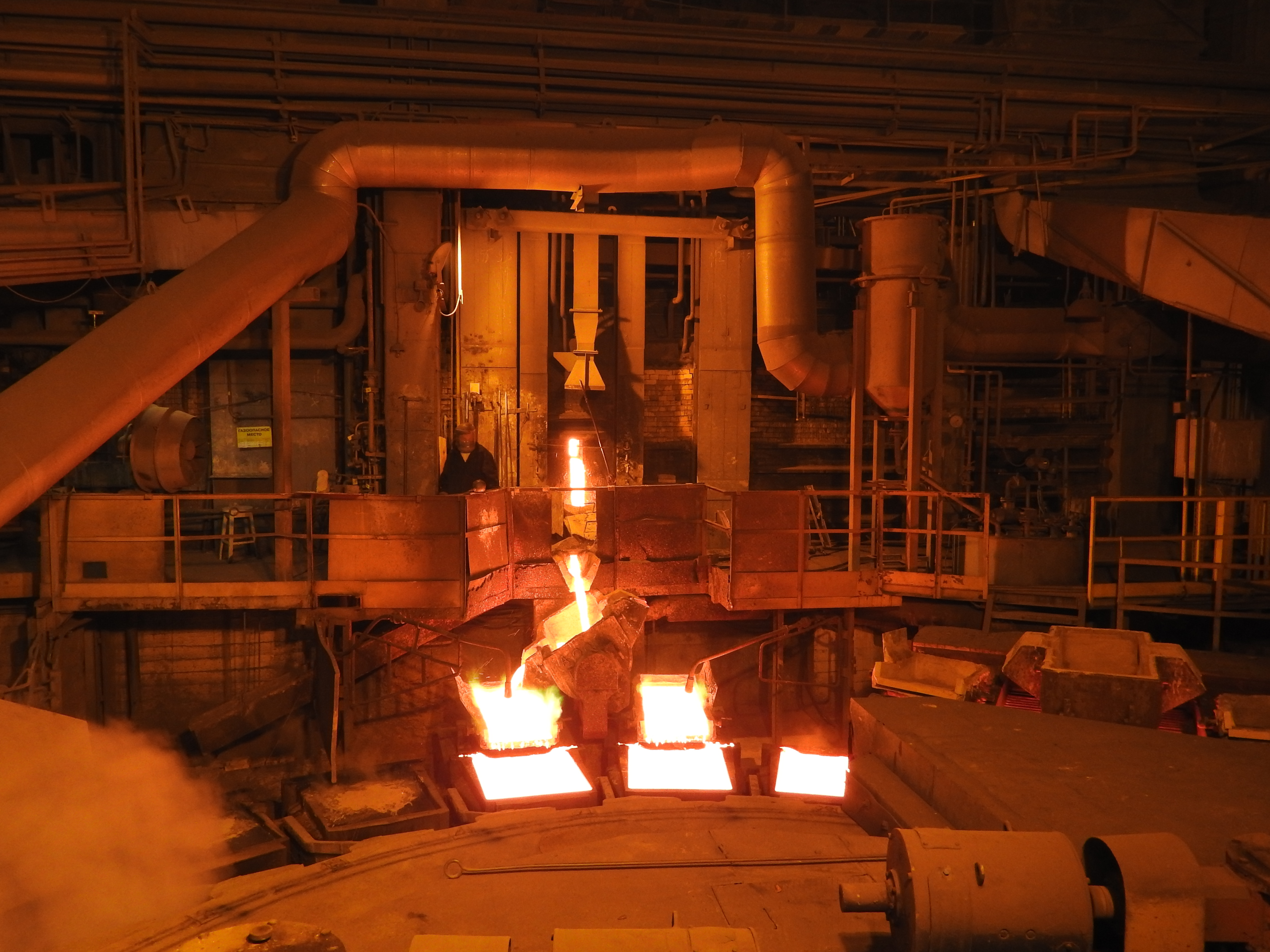 Розлив расплавленной меди на заводе Уралэлектромедь.